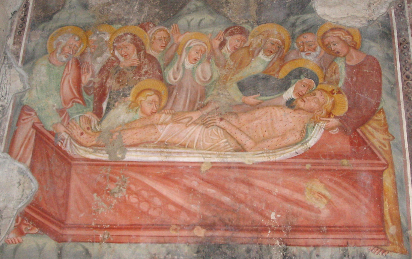 Deposizione nel sarcofago, affresco del XV secolo. Di incerta attribuzione. Chiesa di San Giorgio in Lemine (ad Almenno San Salvatore, Bergamo). Fotografia di Giorces.